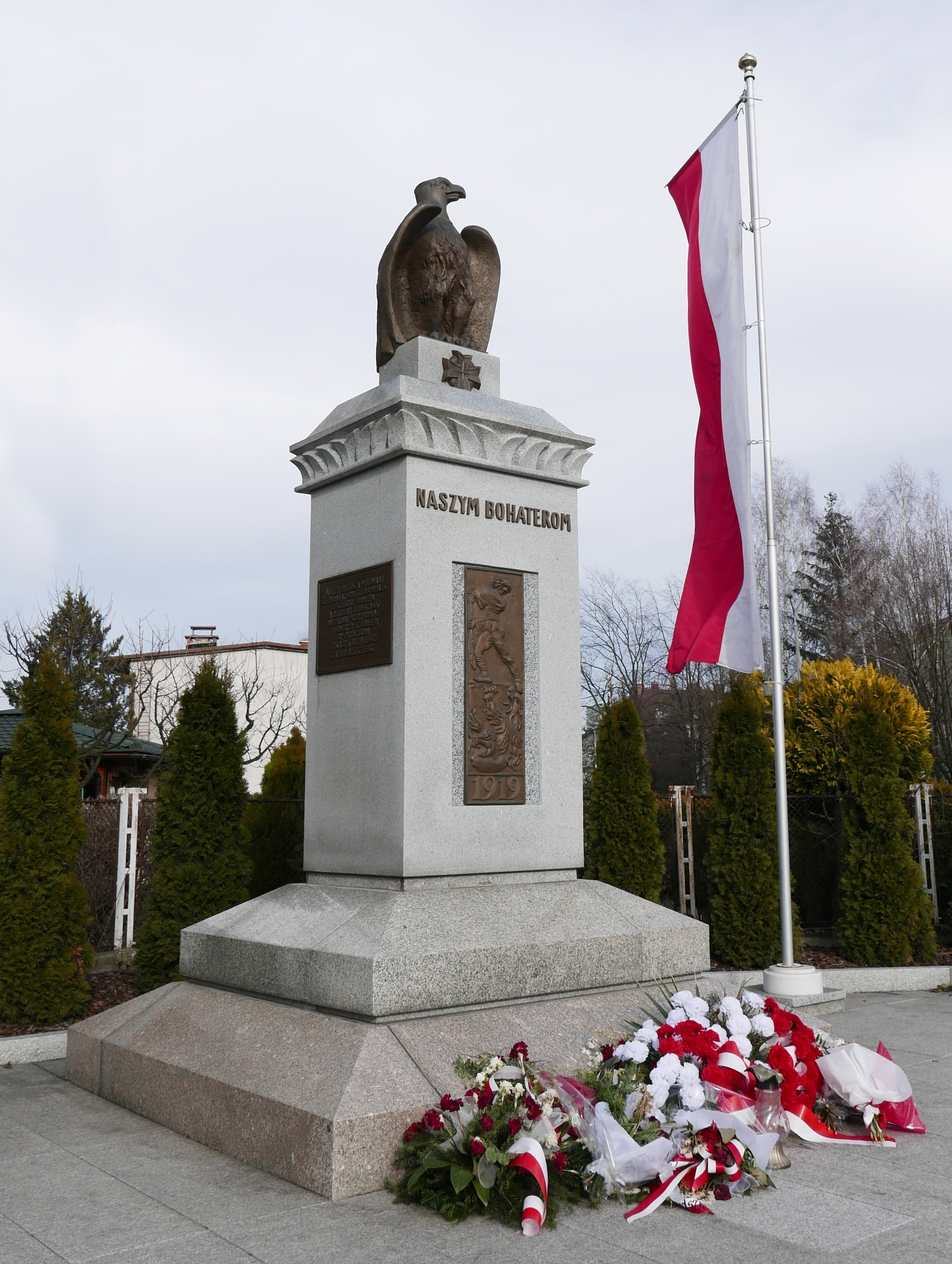 Dla upamiętnienia bohaterstwa oraz ofiary krwi i życia żołnierzy polskich poległych w Bitwie pod Skoczowem 28-30 stycznia 1919 roku, z inicjatywy gminy Towarzystwo Gimnastyczne "Sokół", a głównie prezes Józef Staszko, wznieśli pomnik "Naszym Bohaterom". Projekt monumentu wykonał prof. Jan Raszka, zaś rzeźbę orła i płaskorzeźby - krakowski artysta Henryk Waldyn. Czołowa płyta płaskorzeźby przedstawiała alegoryczną wizję walki z czeskim lwem, boczne zawierały strofy patriotycznego wiersza ks. Emanuela Grima. Pomnik odsłonięto w 1924 roku. Niemcy zburzyli go we wrześniu 1939 roku. W 1961 roku na jego miejscu postawiono pomnik "Poległym za polskość Śląska" wg projektu Artura Cienciały. Przedstawiono na nim sceny związane z walką o polski Śląsk. Pomnik rozebrano w 2015 roku i na jego miejscu odbudowano przedwojenny pomnik "Naszym Bohaterom" na podstawie archiwalnych fotografii. Całość zaprojektował architekt Ludwik Herok a autorem rzeźby był prof. Jan Herma. Nowy pomnik odsłonięto 11 listopada 2015 roku.